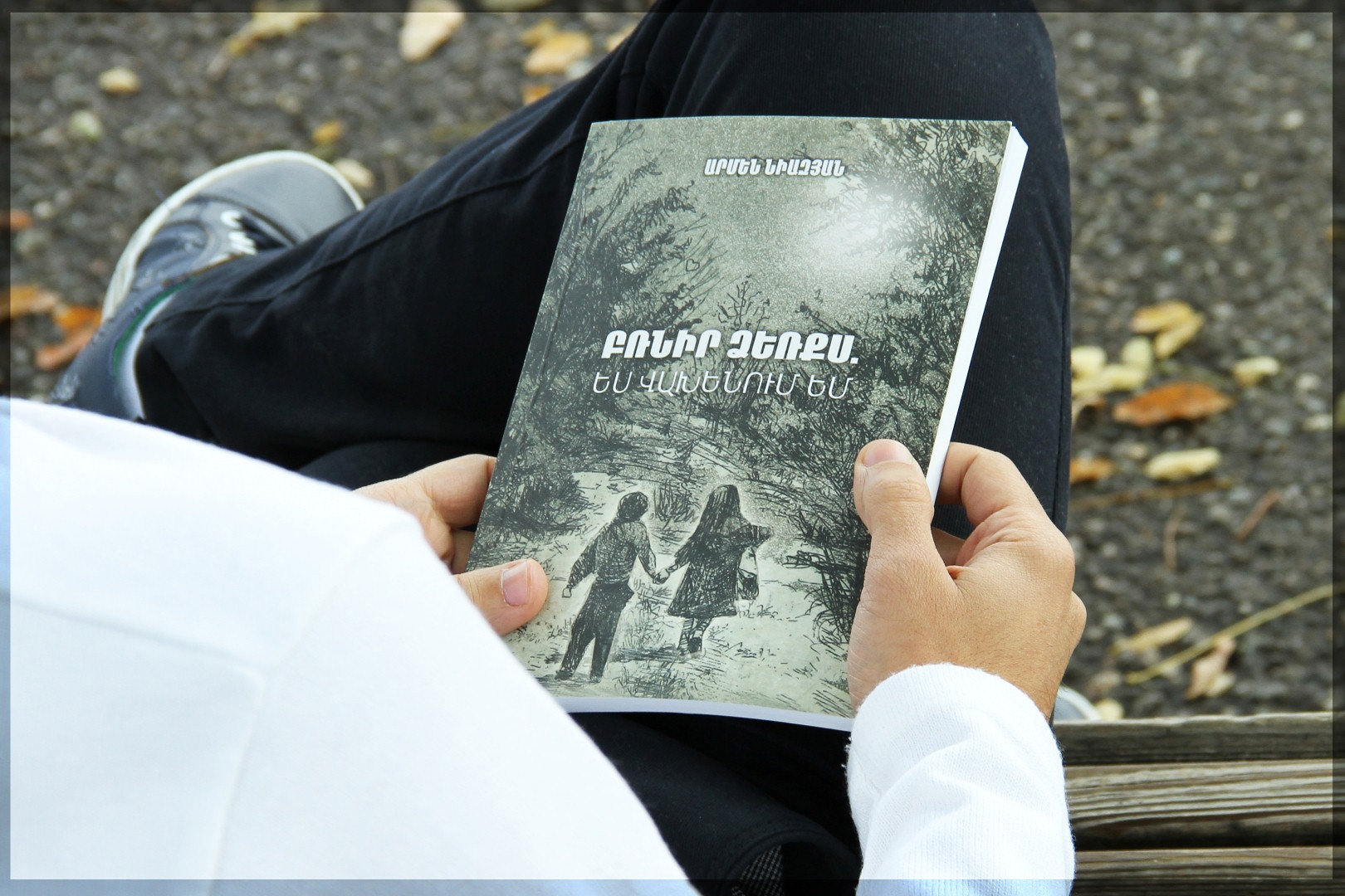 Բռնիր ձեռքս. ես վախենում եմ